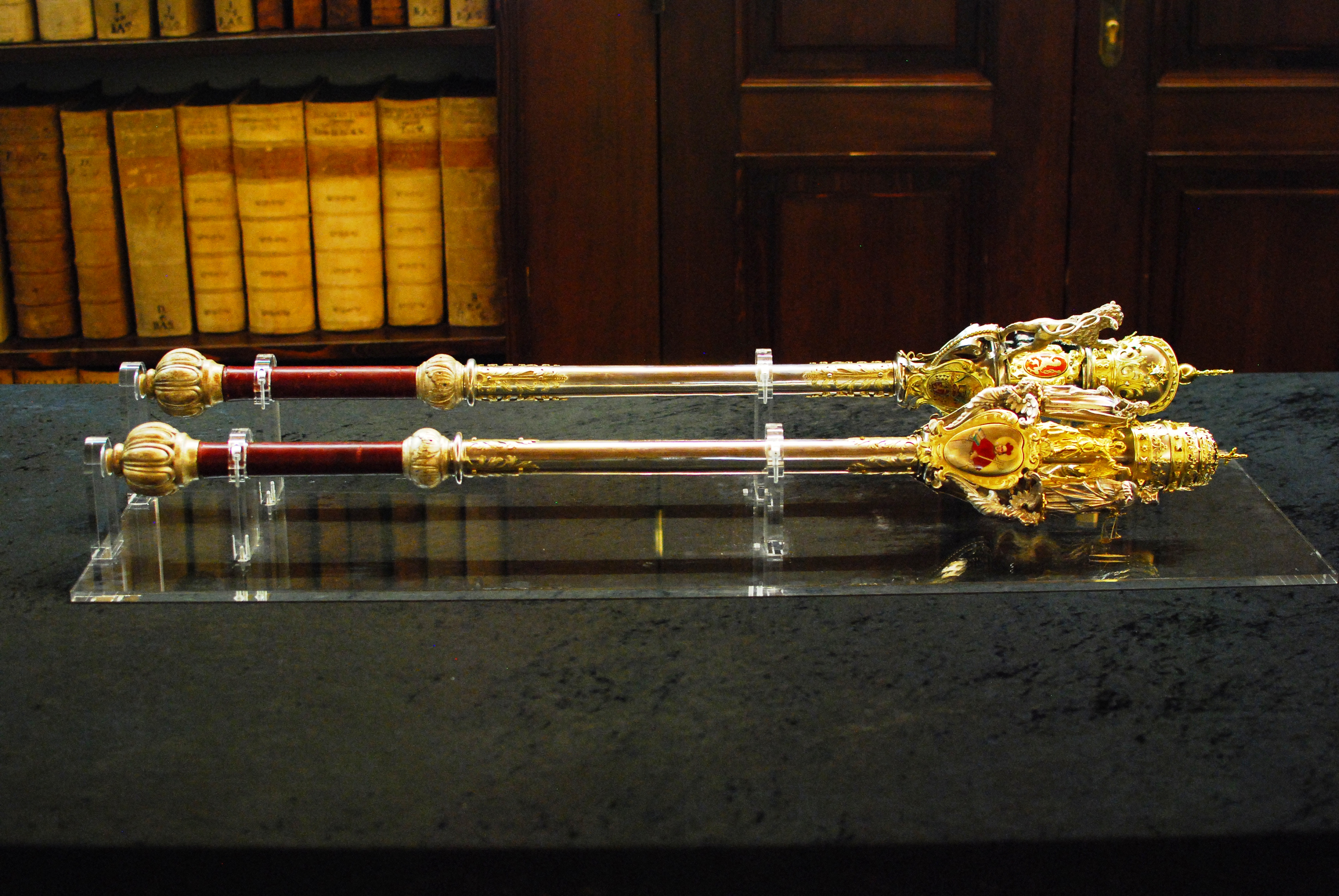 Szepter der Universität Salzburg, Österreich.